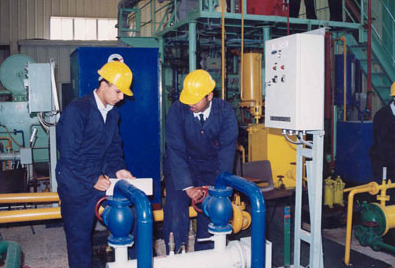 دراسة أساسها التدريب العملي